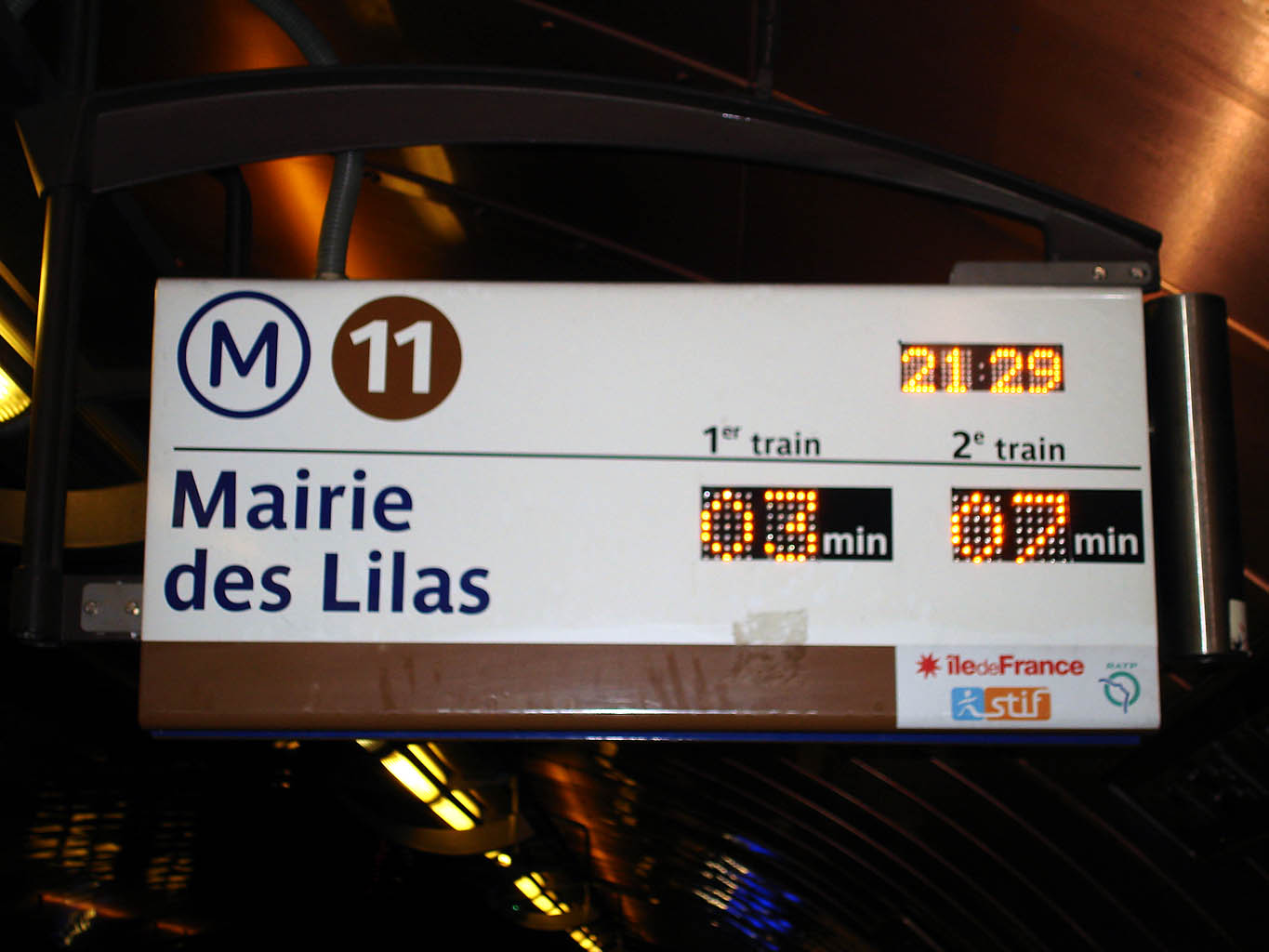 Métro de Paris (France) - ligne 11 - Panneau SIEL à la station Arts et Métiers